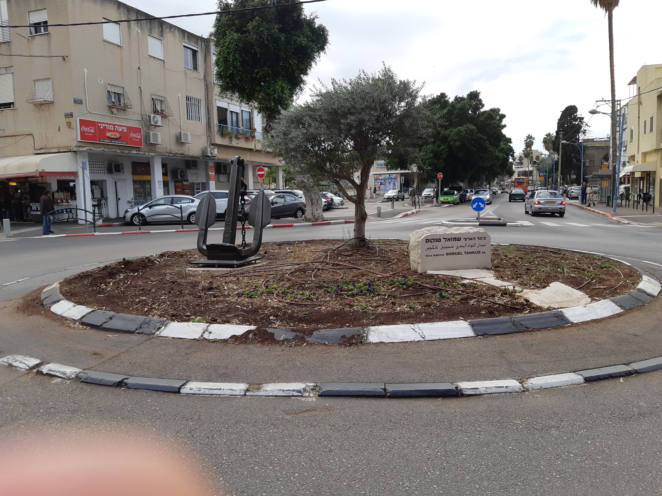 ככר על שם האלוף שמואל טנקוס בשכונת בת גלים